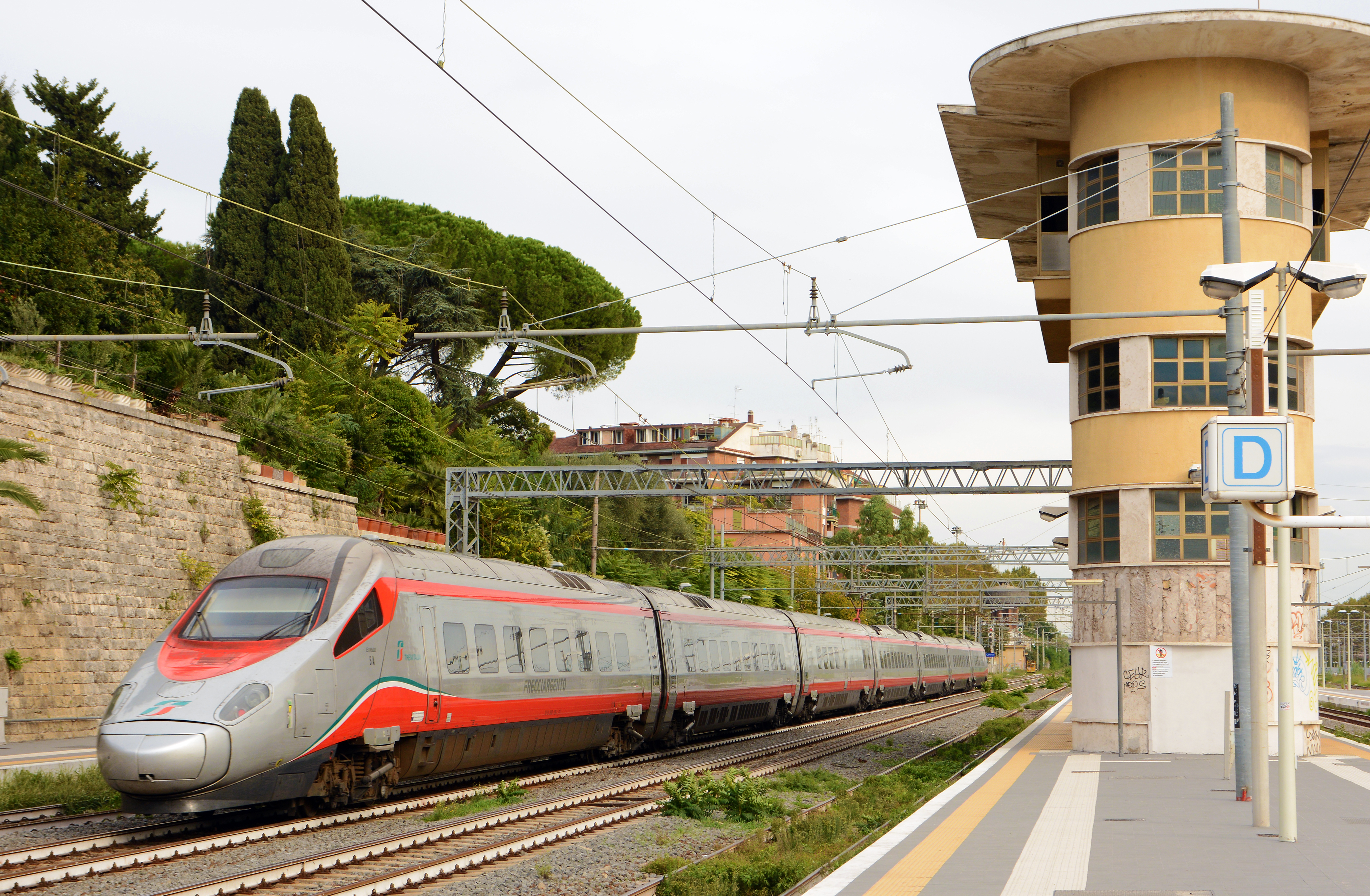 Alstom Pendolino